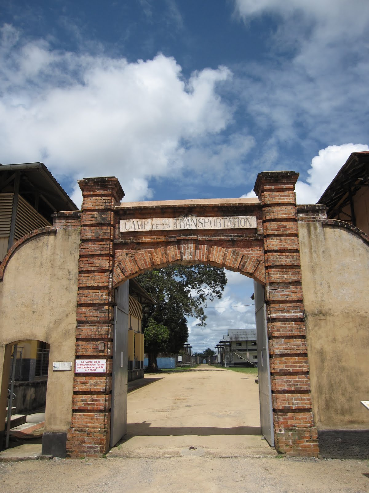 Entrée du camp de la transportation à Saint-Laurent-du-Maroni